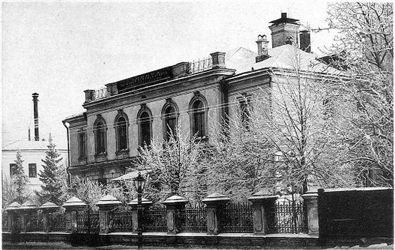 Здание клиники ушных и горловых болезней имени Базановой в Клиническом городке Московского университета на Девичьем поле (1896).